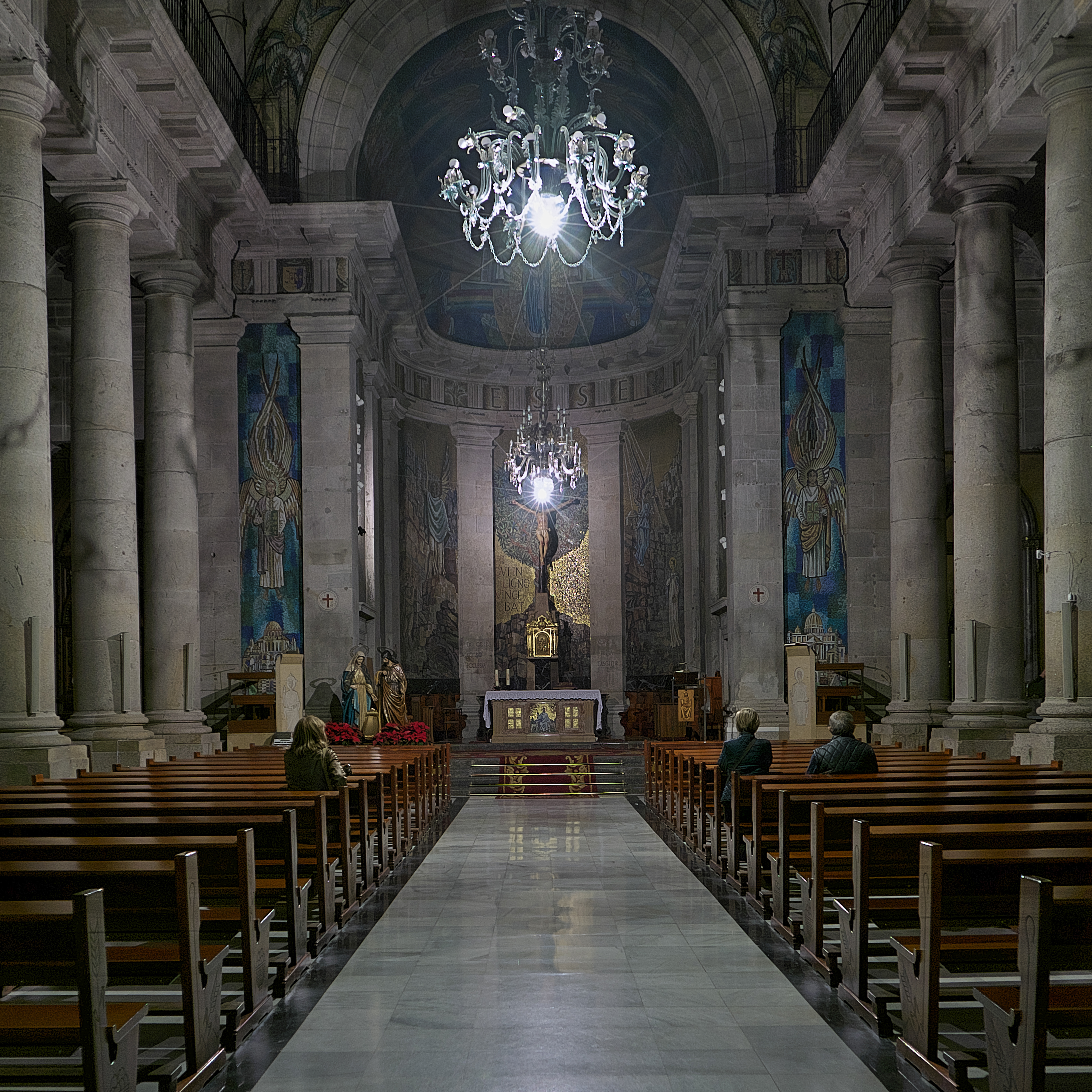 Melchor de Prado y Mariño (1816-1838) reconstruye la iglesia con su arquitectura neoclásica, con potentes columnas toscanas y un pronunciado ábside central.